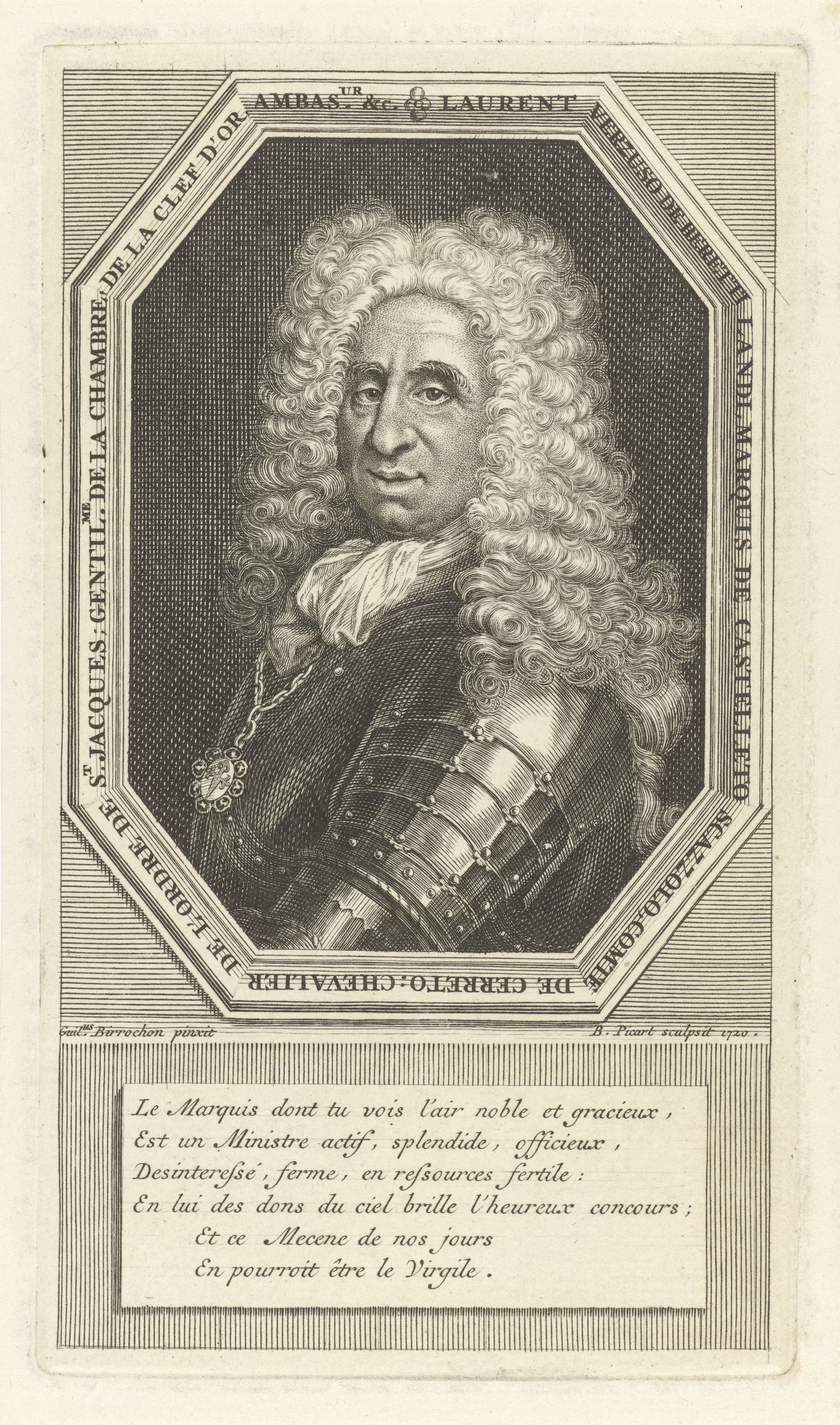 IdentificatieTitel(s): Portret van Lorenzo di Vergiuso, markies van Beretti-LandiObjecttype: prent Objectnummer: RP-P-OB-51.042Catalogusreferentie: LeBlanc 5472(2)Opmerking: staat bepaald aan de hand van aanwezige prenten in RijksprentenkabinetOpschriften / Merken: verzamelaarsmerk, verso links, gestempeld: Lugt 2228Omschrijving: Portret van Lorenzo di Vergiuso, markies van Beretti-Landi: Italiaans edelman in Spaanse dienst als ambassadeur in Den Haag. In het kader een zesregelig onderschrift in het Frans.VervaardigingVervaardiger: prentmaker: Bernard Picart (vermeld op object)naar schilderij van: Guillaume Birochon (vermeld op object)Plaats vervaardiging: AmsterdamDatering: 1720Fysieke kenmerken: ets en gravureMateriaal: papier Techniek: etsen / graveren (drukprocedé)Afmetingen: plaatrand: h 142 mm × b 82 mmOnderwerpWat: armourWie: Lorenzo di Vergiuso markies van Beretti-LandiVerwerving en rechtenVerwerving: onbekendCopyright: Publiek domein